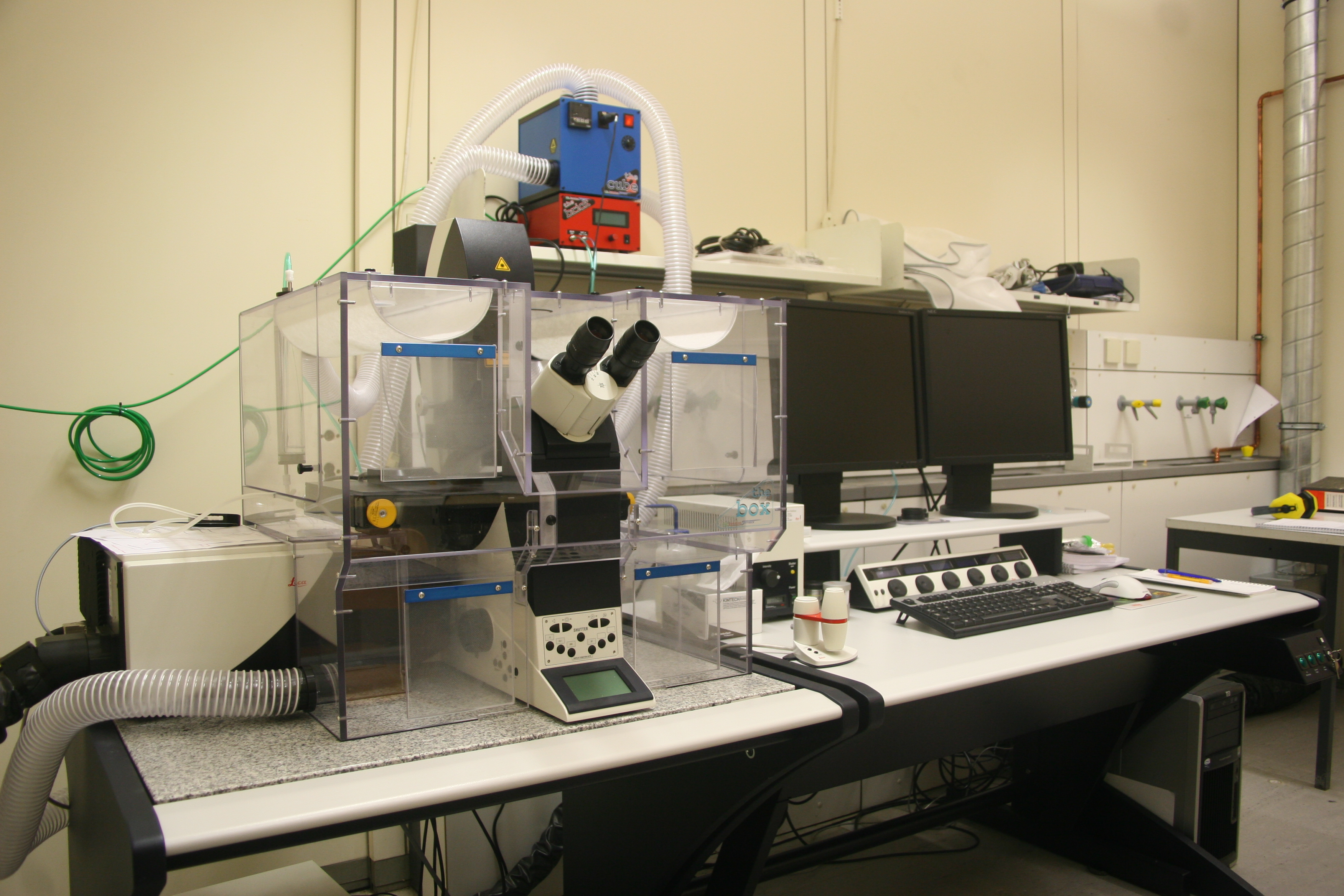 Konfokalmikroskop im Theoretikum der Ruprecht-Karls-Universität Heidelberg - IPMB - Institut für Pharmazie und Molekulare Biotechnologie, Abteilung: Pharmazeutische Technologie